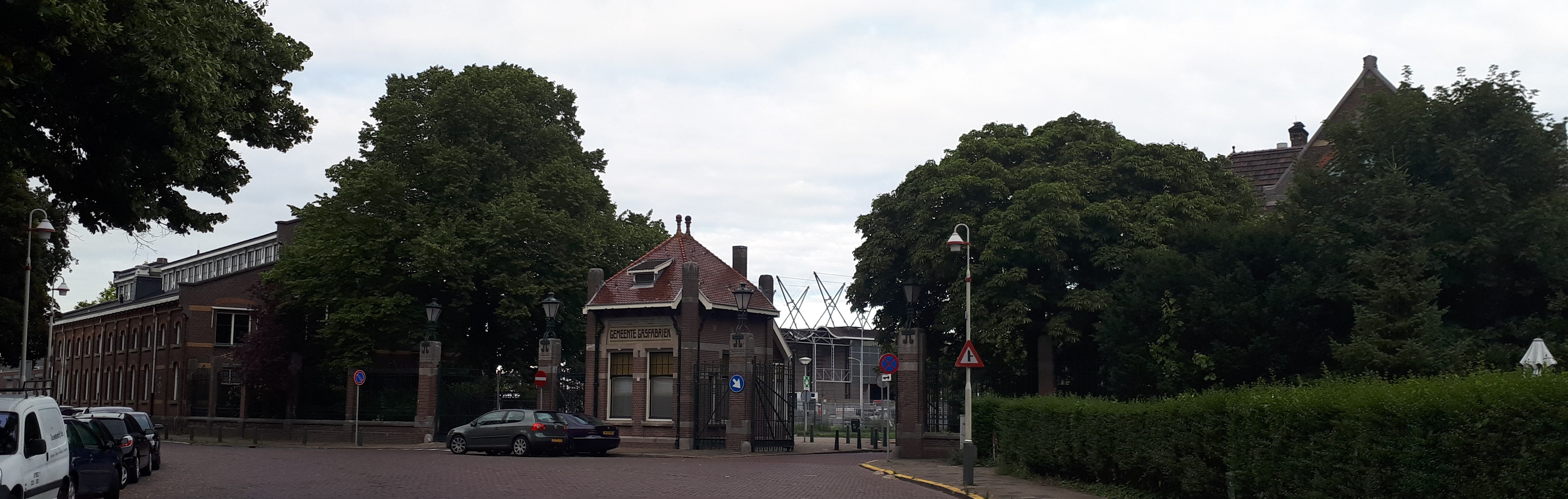 Poortgebouw, fabrieksgebouw en kantoor van de Gasfabriek Den Haag.